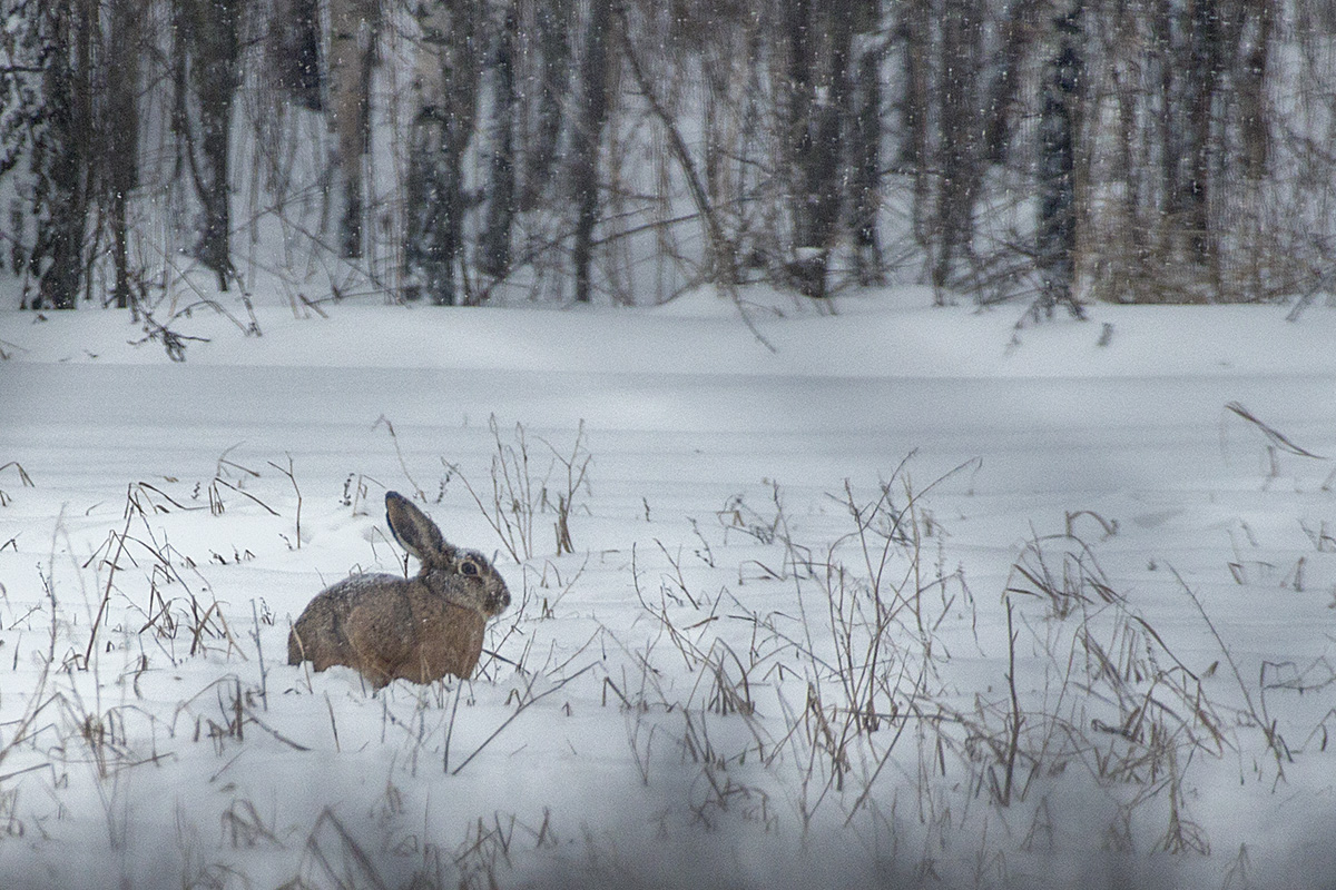 Zając szarak, Łódź(Polska)